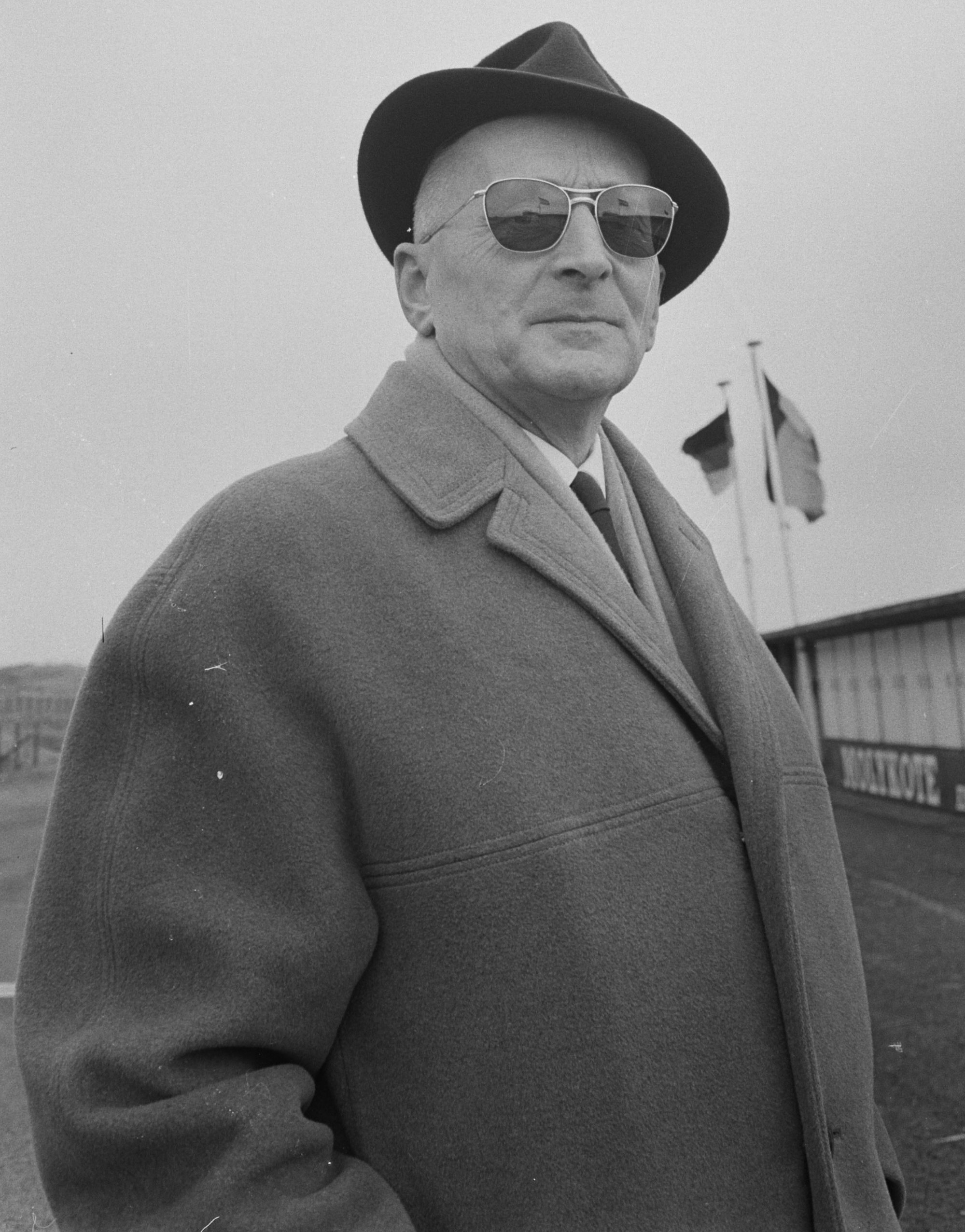 Collectie / Archief : Fotocollectie Anefo Reportage / Serie : [ onbekend ] Beschrijving : Burgemeester Van Fenema (Zandvoort) Datum : 28 maart 1962 Locatie : Noord-Holland, Zandvoort Fotograaf : Pot, Harry / Anefo Auteursrechthebbende : Nationaal Archief Materiaalsoort : Negatief (zwart/wit) Nummer archiefinventaris : bekijk toegang 2.24.01.05 Bestanddeelnummer : 913-6981